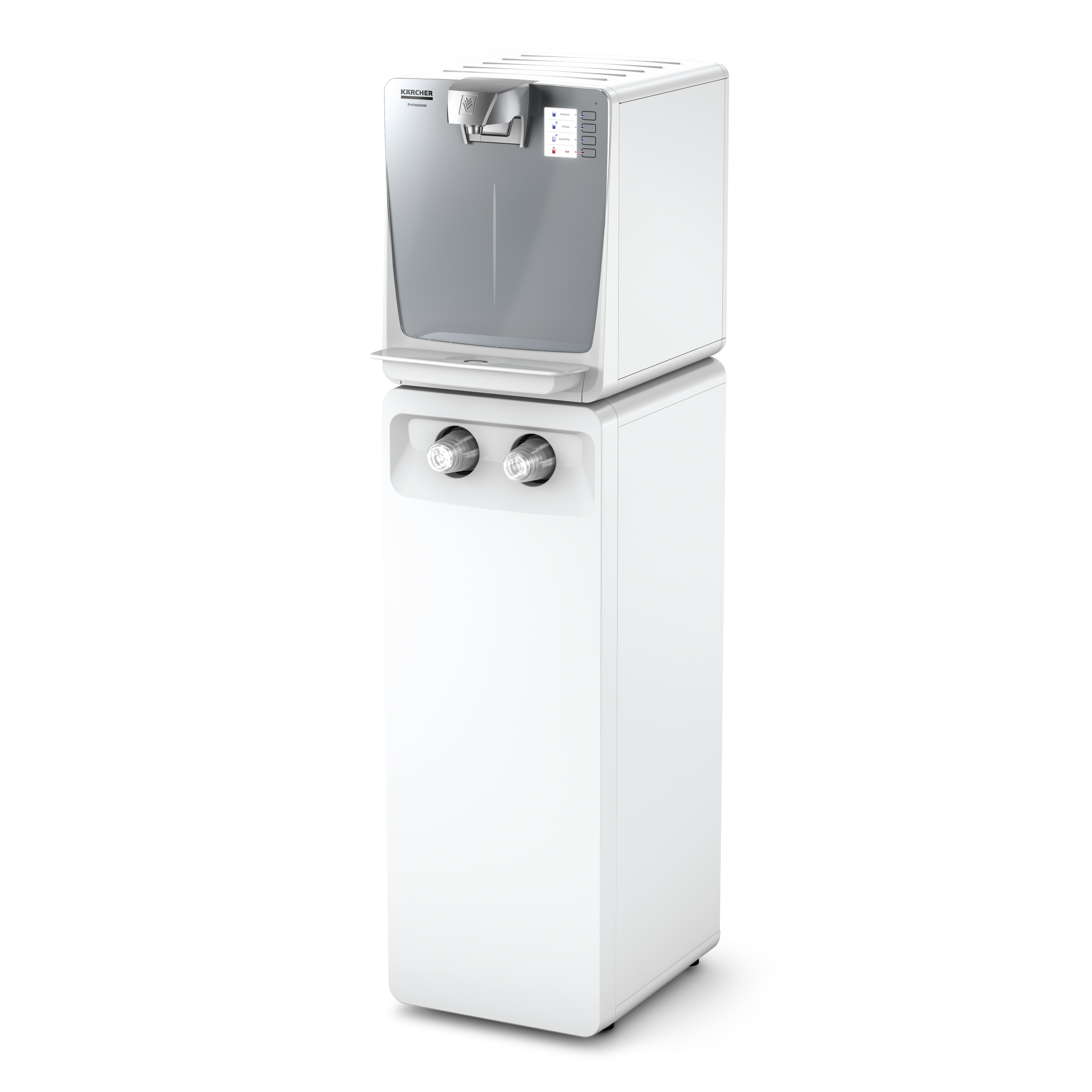 Kärcher Wasserspender WPD